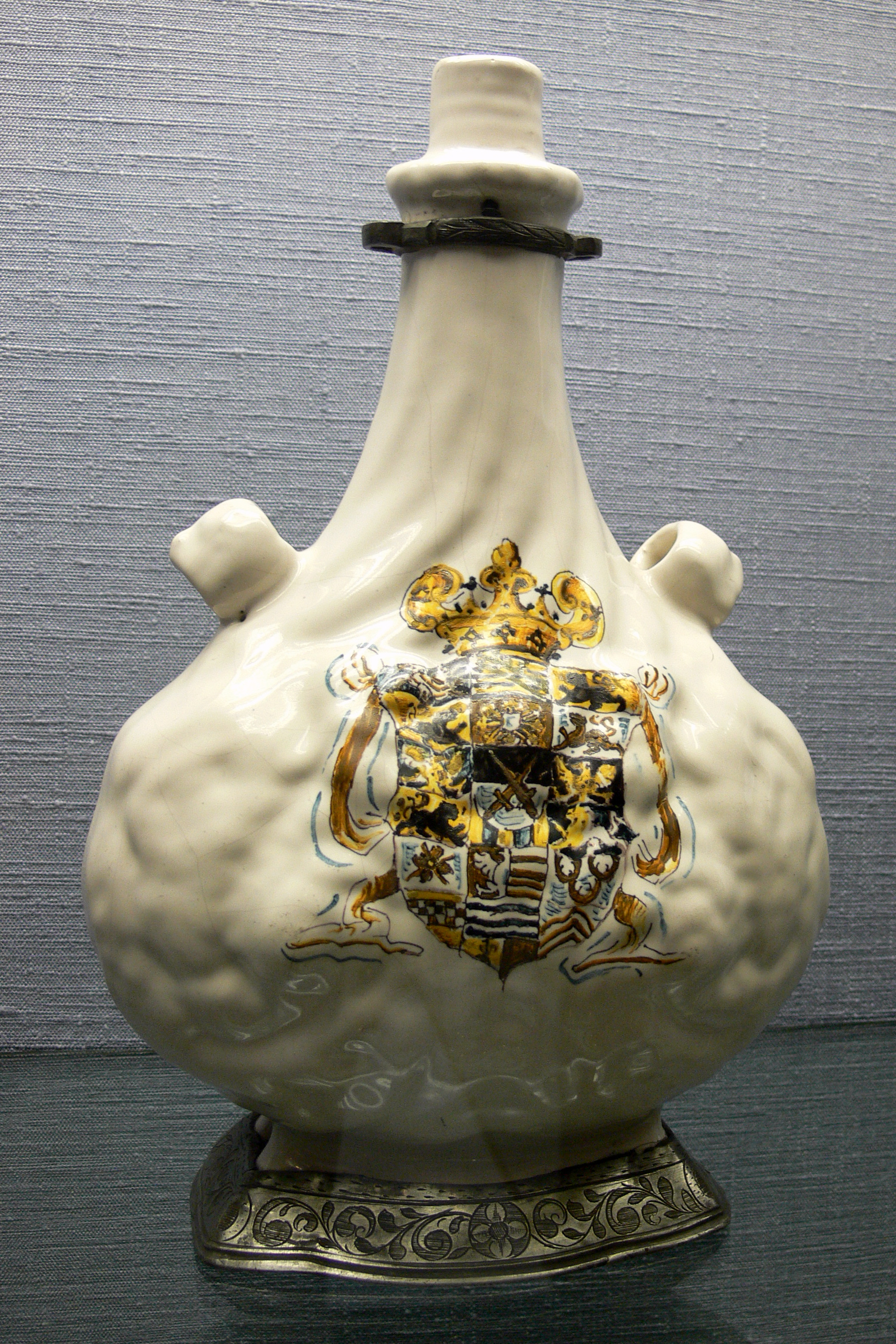 Flasche mit dem Wappen Kursachsens, Glasur „bianco di Faenza“, zwischen 1619 und 1637 Kunstgewerbemuseum Berlin, Inv. Nr. K 2328